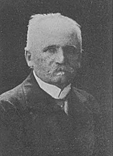 Placyd Dziwiński